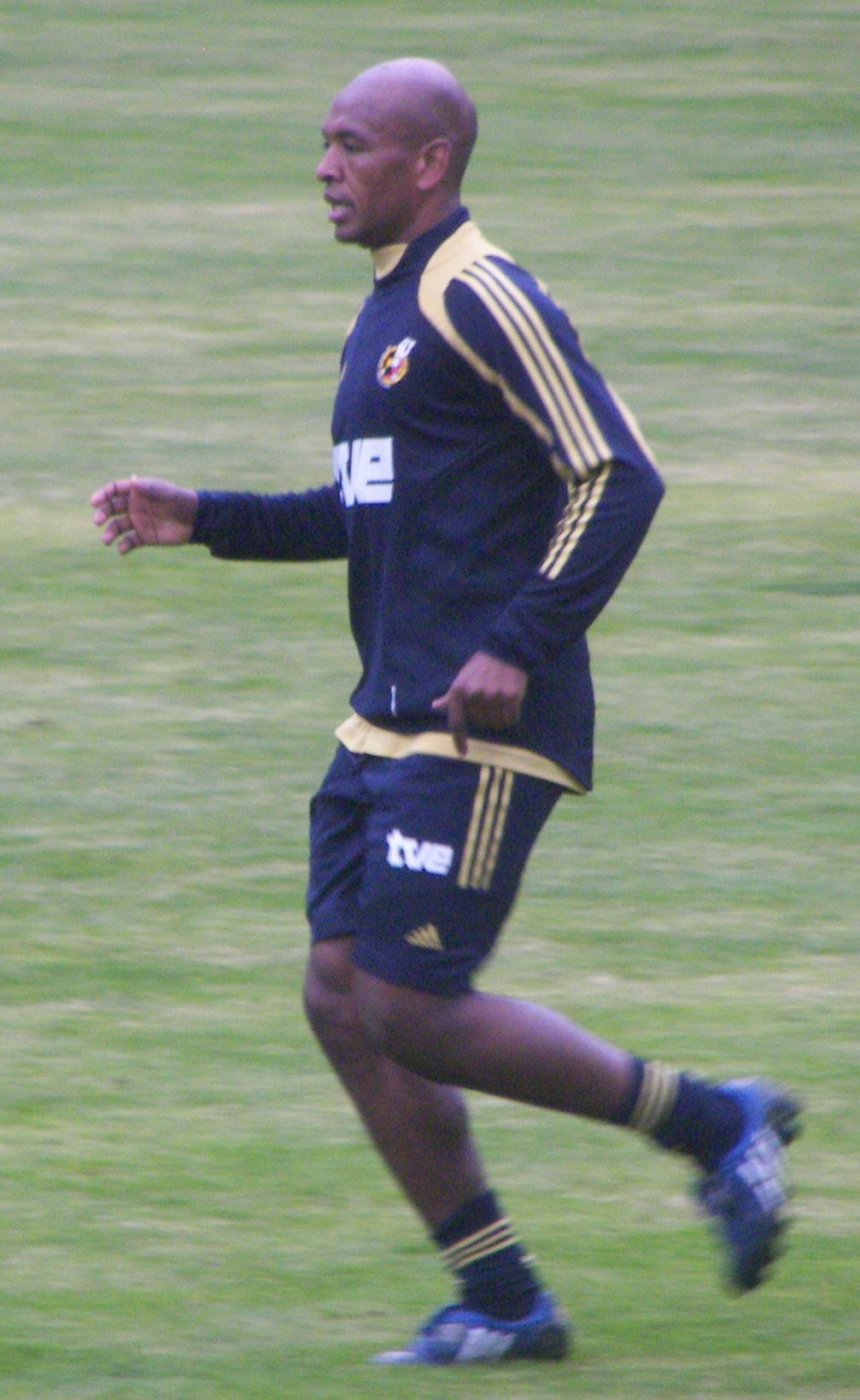 Marcos Senna beim Trainingslager Euro08 in Neustift Stubaital 6.6.2008